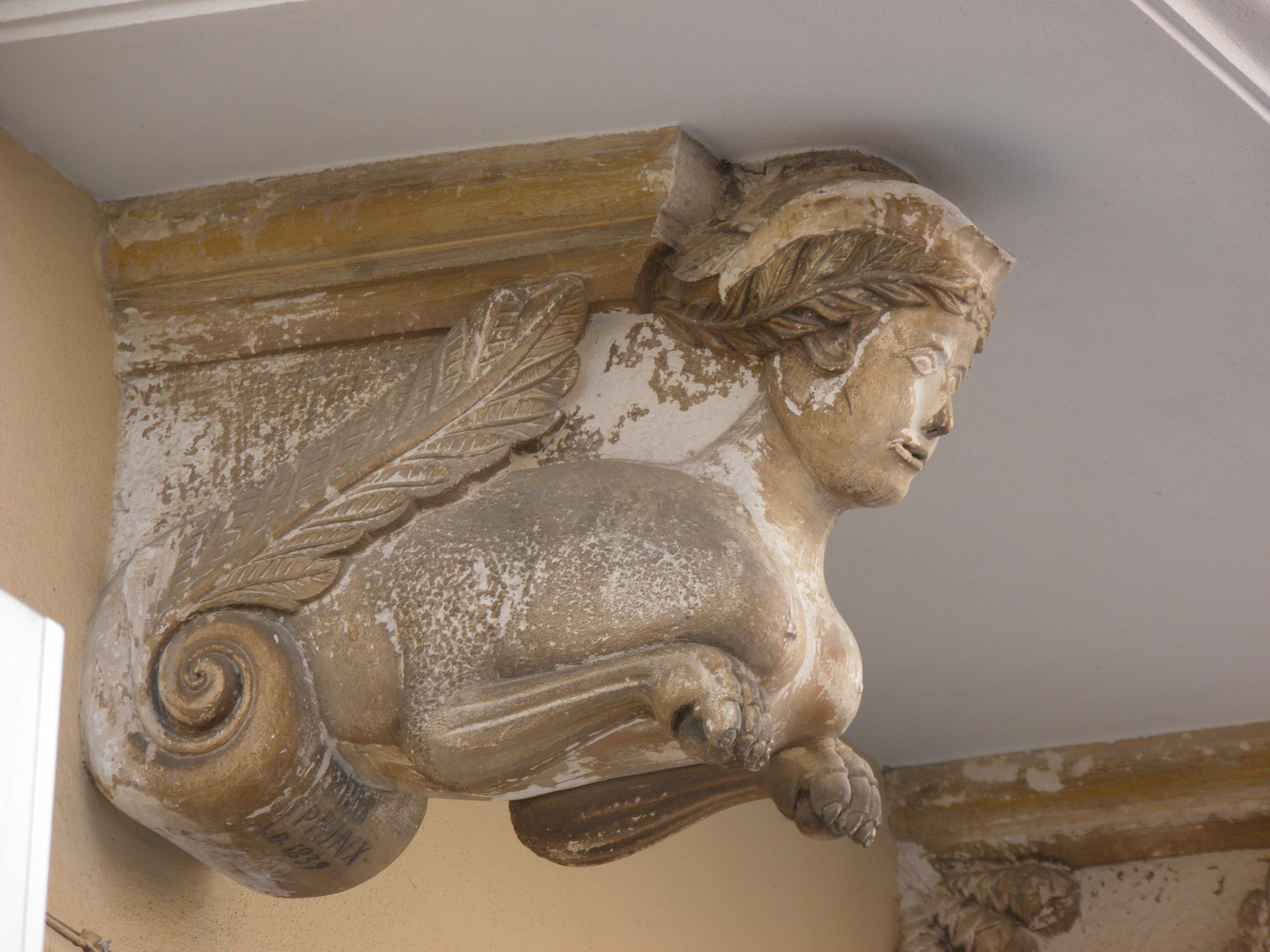 sfinge della casa John Pitkin in Monopoli (BA) con scritta "THE SPHINX" 1839 loggia massonica inglese